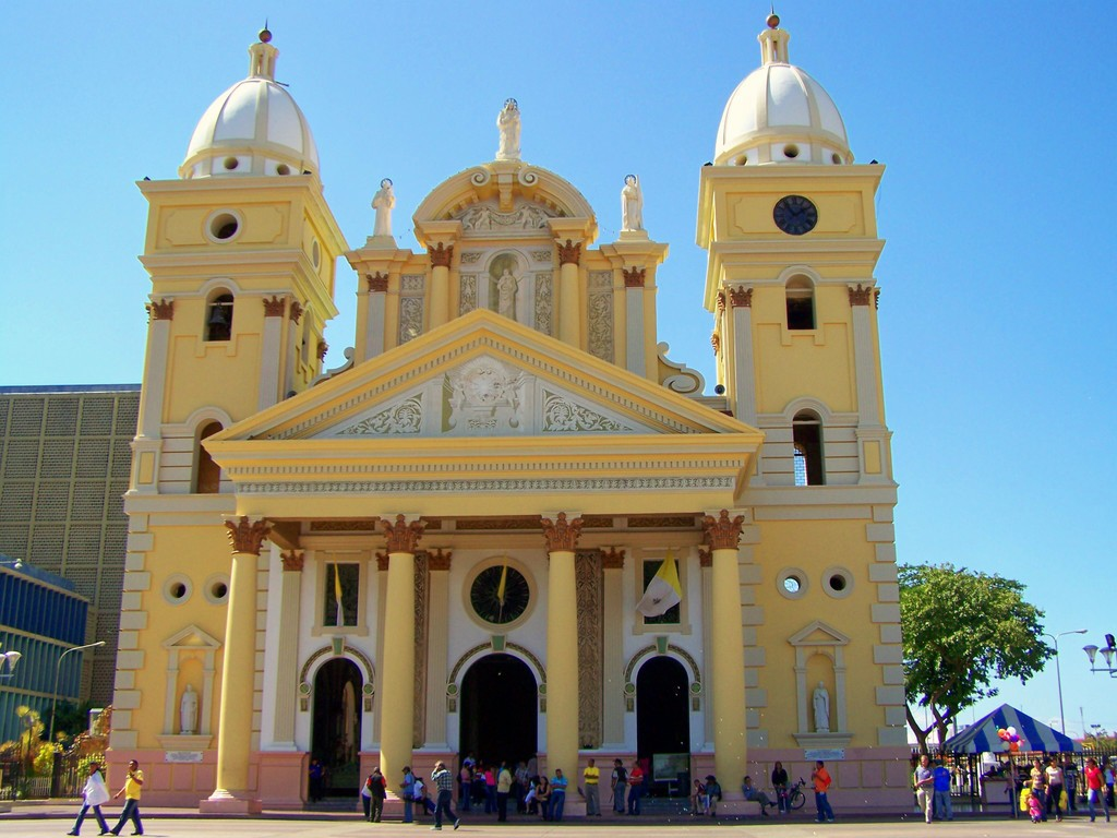 Basilica de N S de Chiquinquira y San Juan de Dios